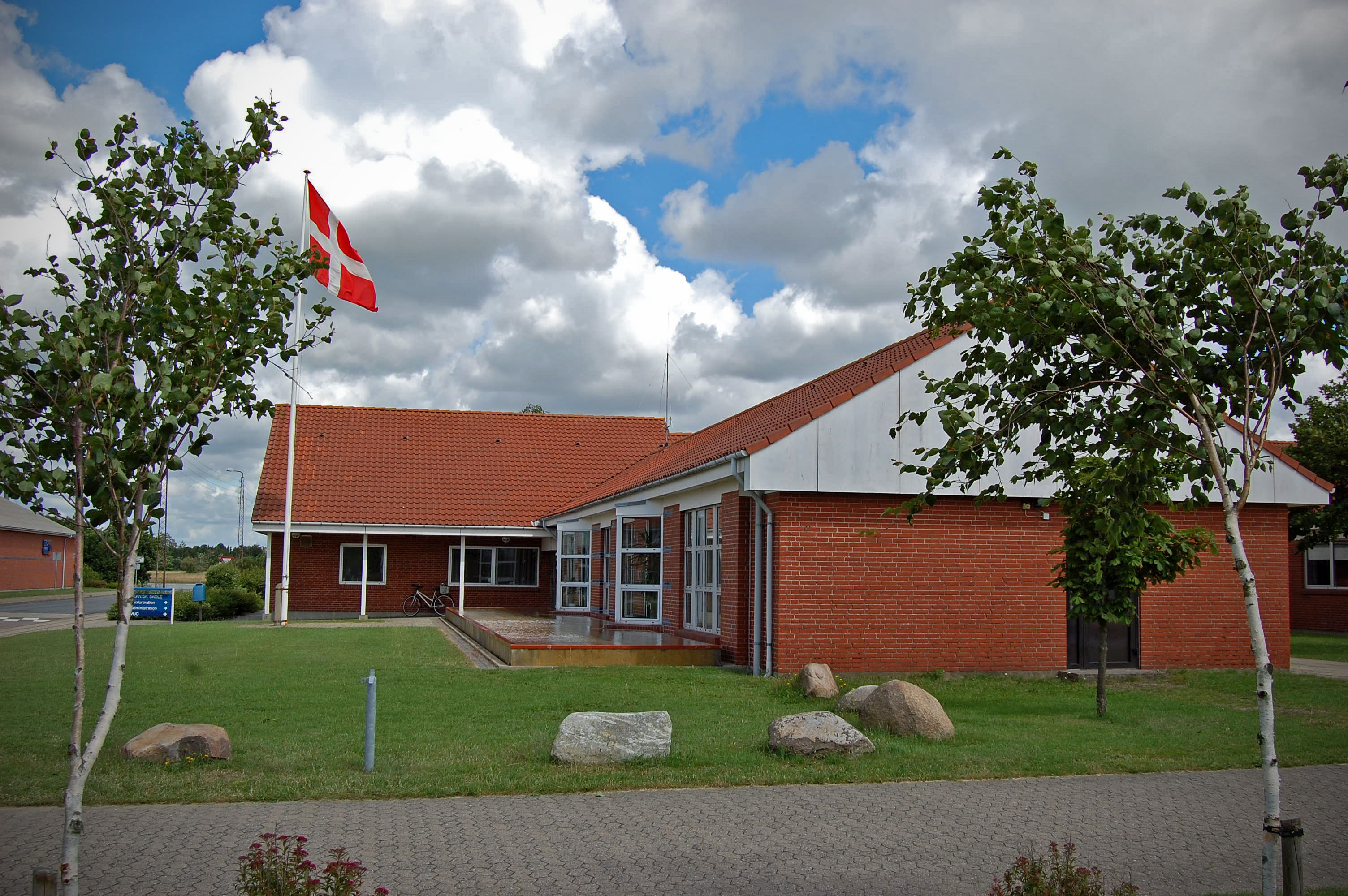 HTX Skjern. Hører under Uddannelsescenter Ringkøbing-Skjern